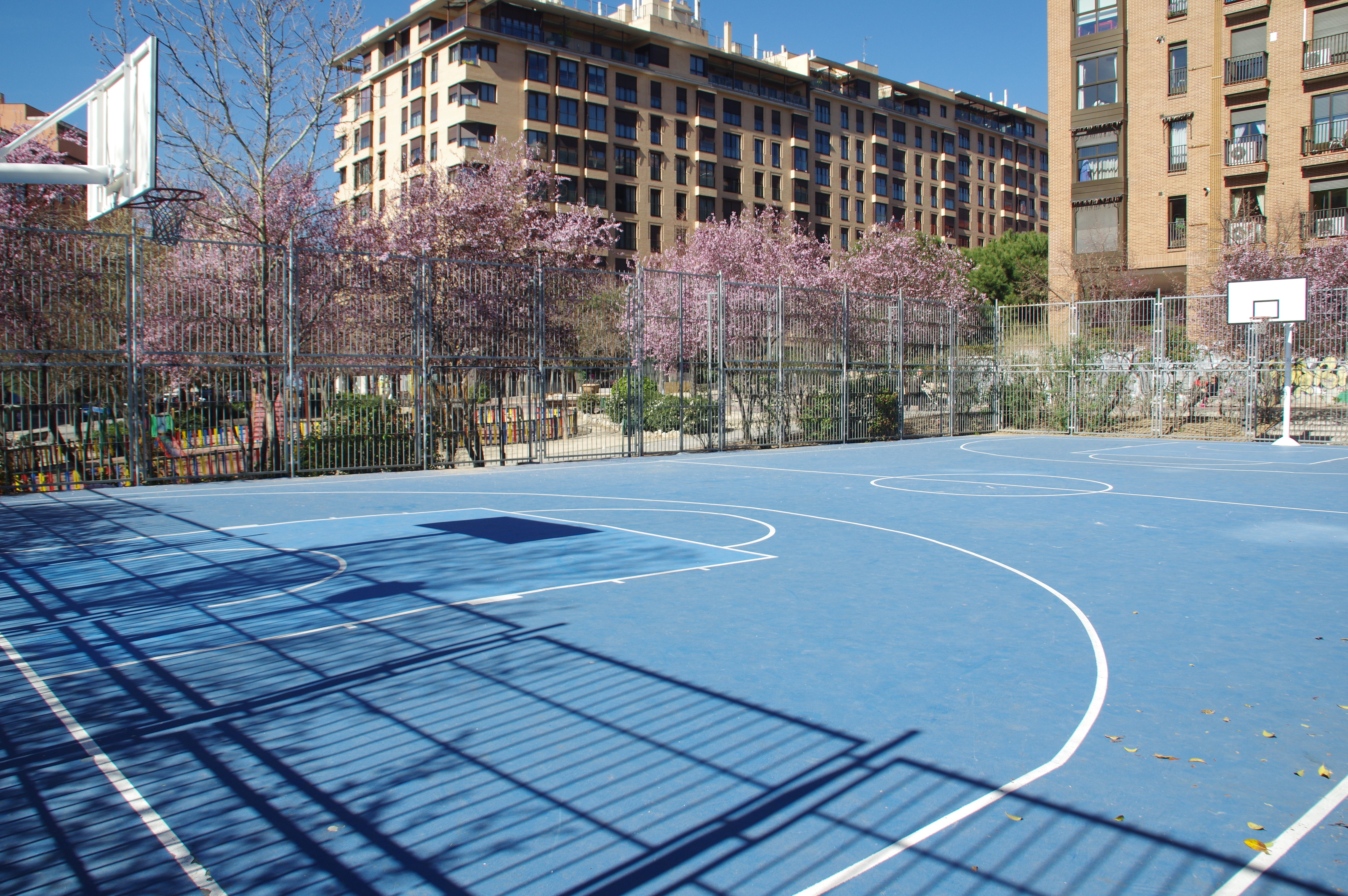 VIEW : ®'s / DiDi / RM / Ð 6k / ┼ : MADRID PARQUE de las ACACIAS (PEÑUELAS)